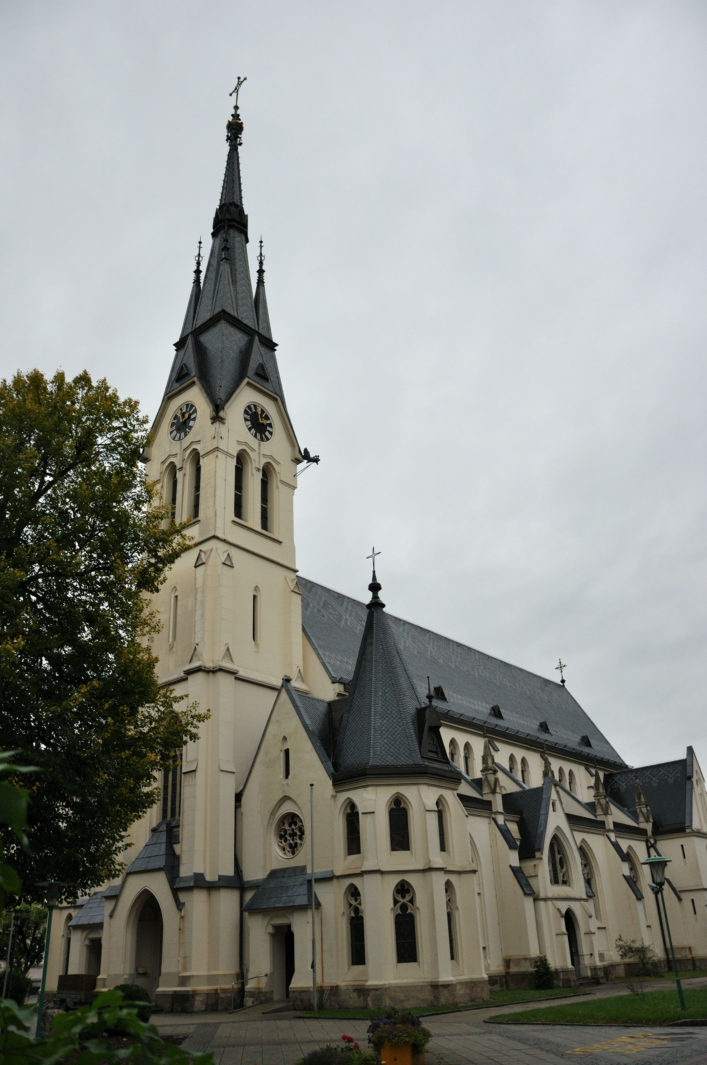 Kath. Pfarrkirche hl. Dionysius